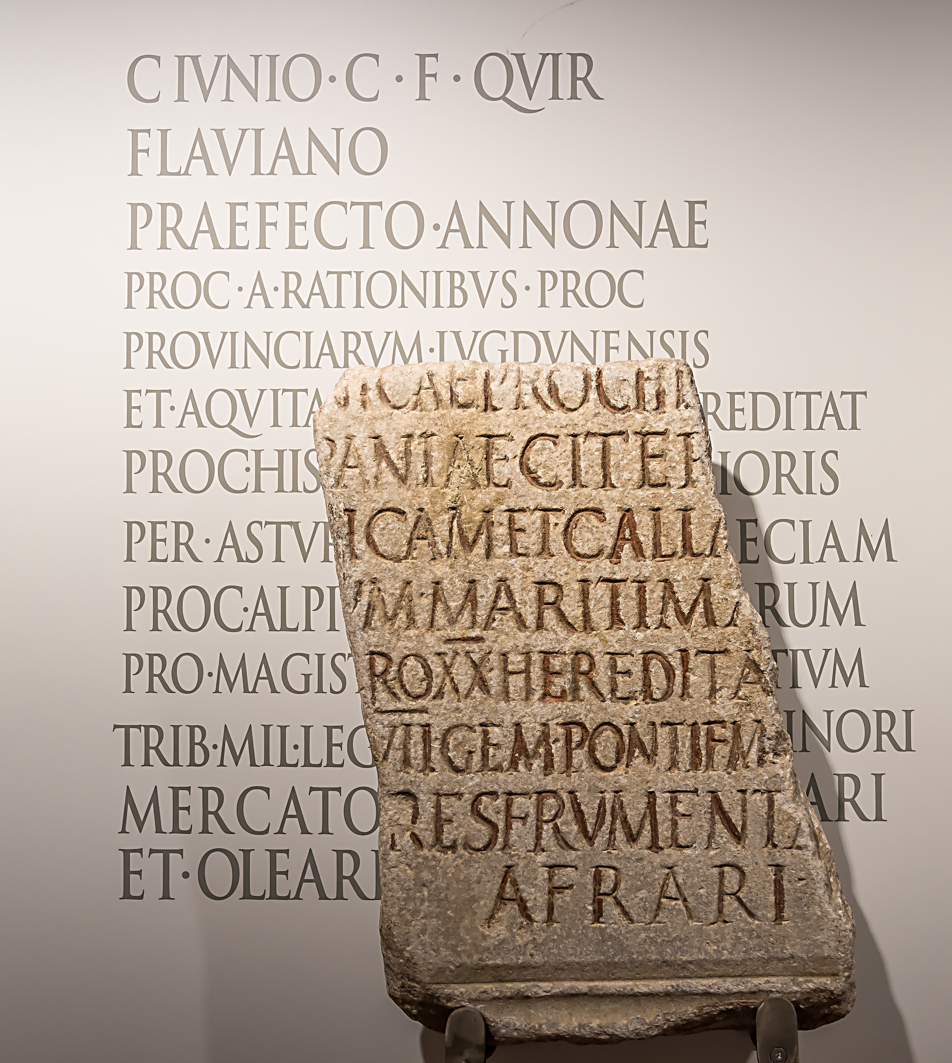 Teilfragment einer Statuenbasis, die von afrikanischen Getreide- und Ölhändlern im 2. Jahrhundert für den praefects annonae der Stadt Rom, G. Iunius Flavianus, gestiftet wurde.